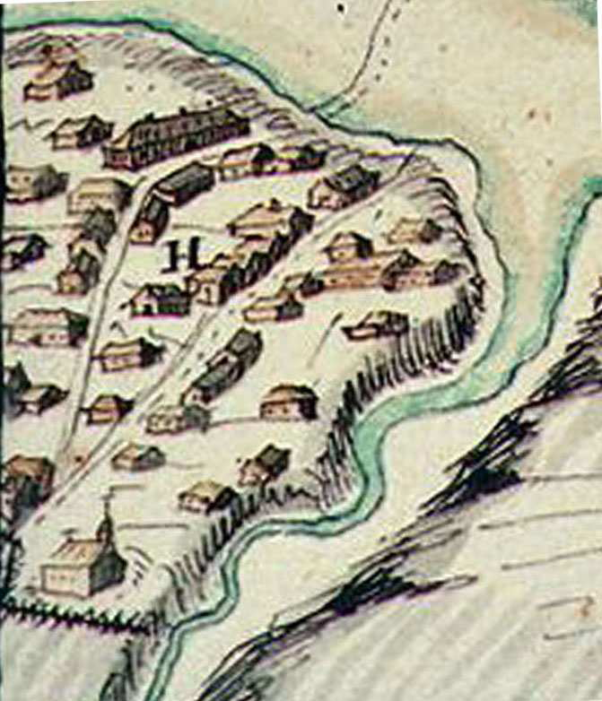 Частка плана Полацка 1707 г. з выявай Экімані